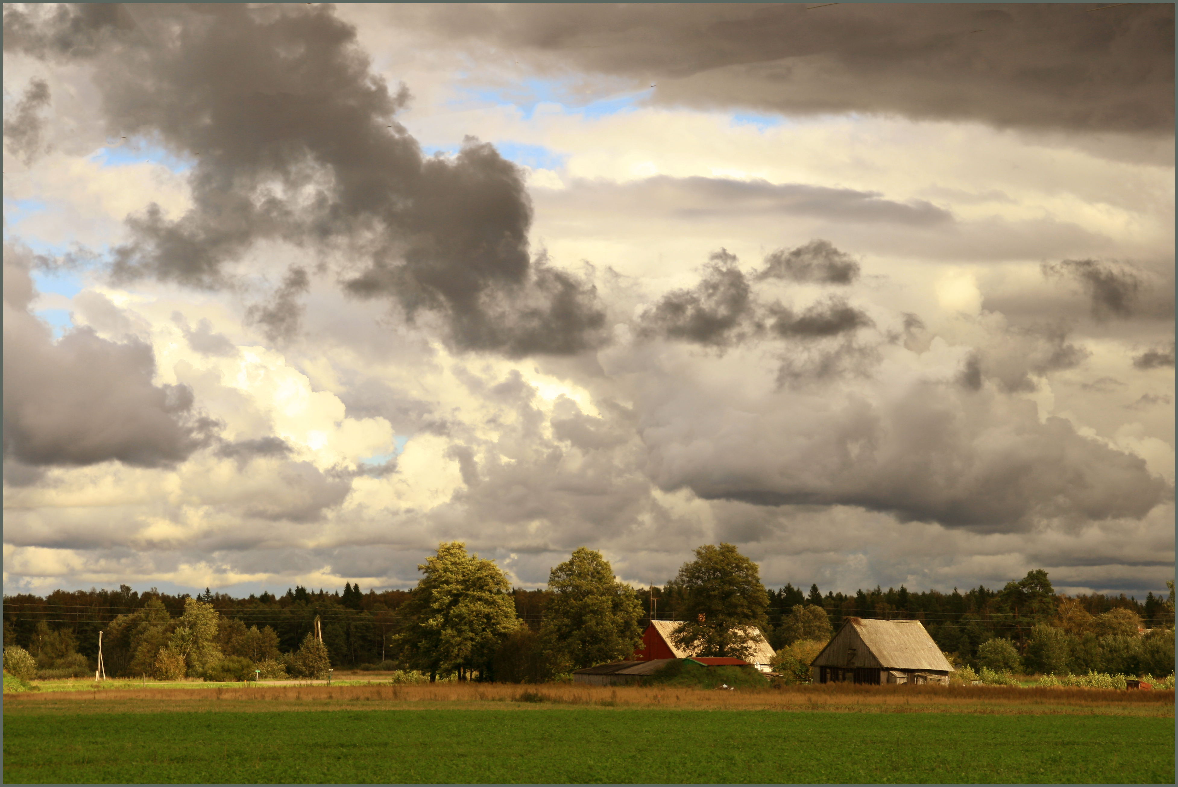 autumn day in Ance